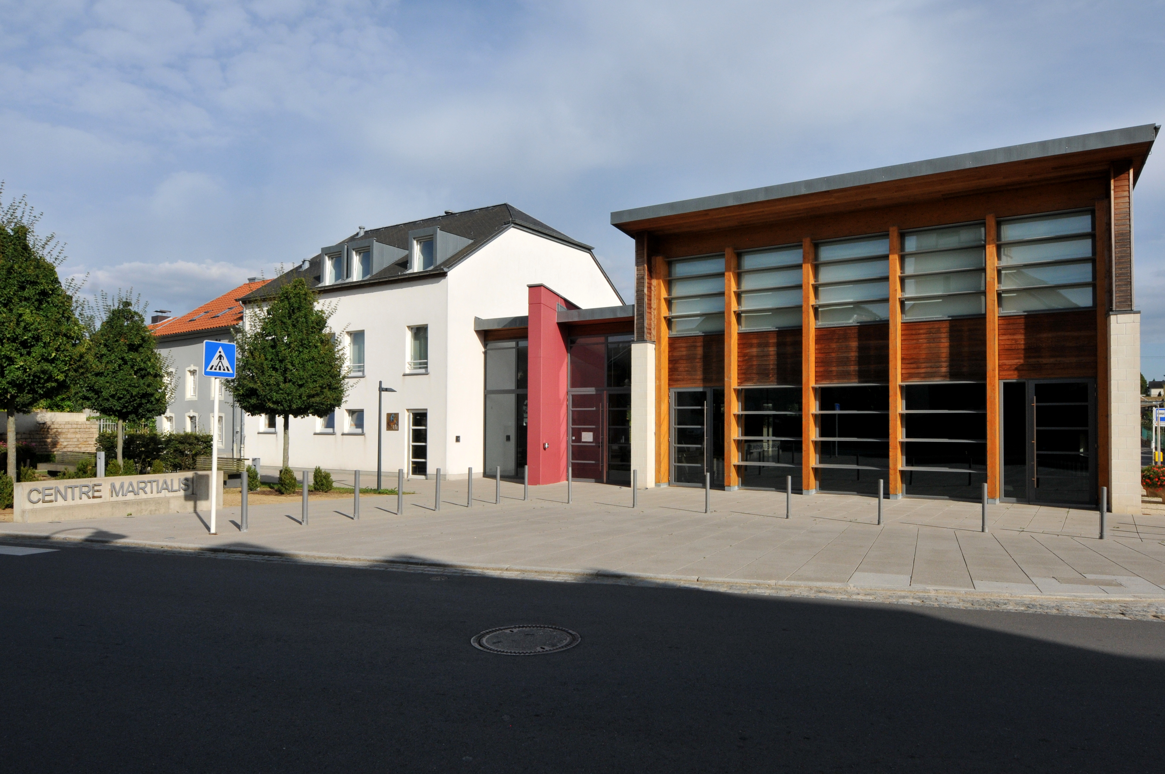 De Centre Martialis zu Elleng.